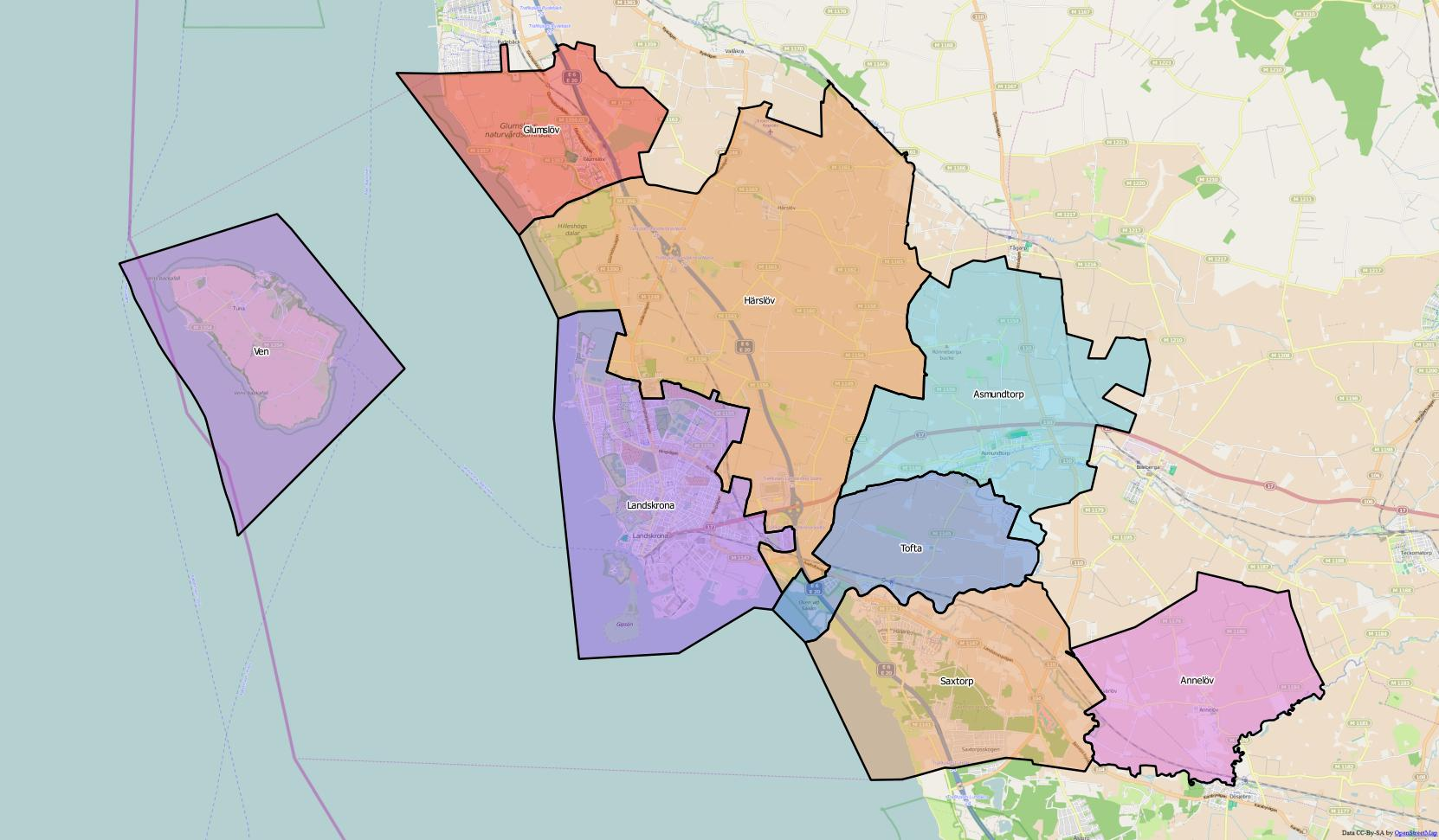 Distriktsindelningen i kommunen.